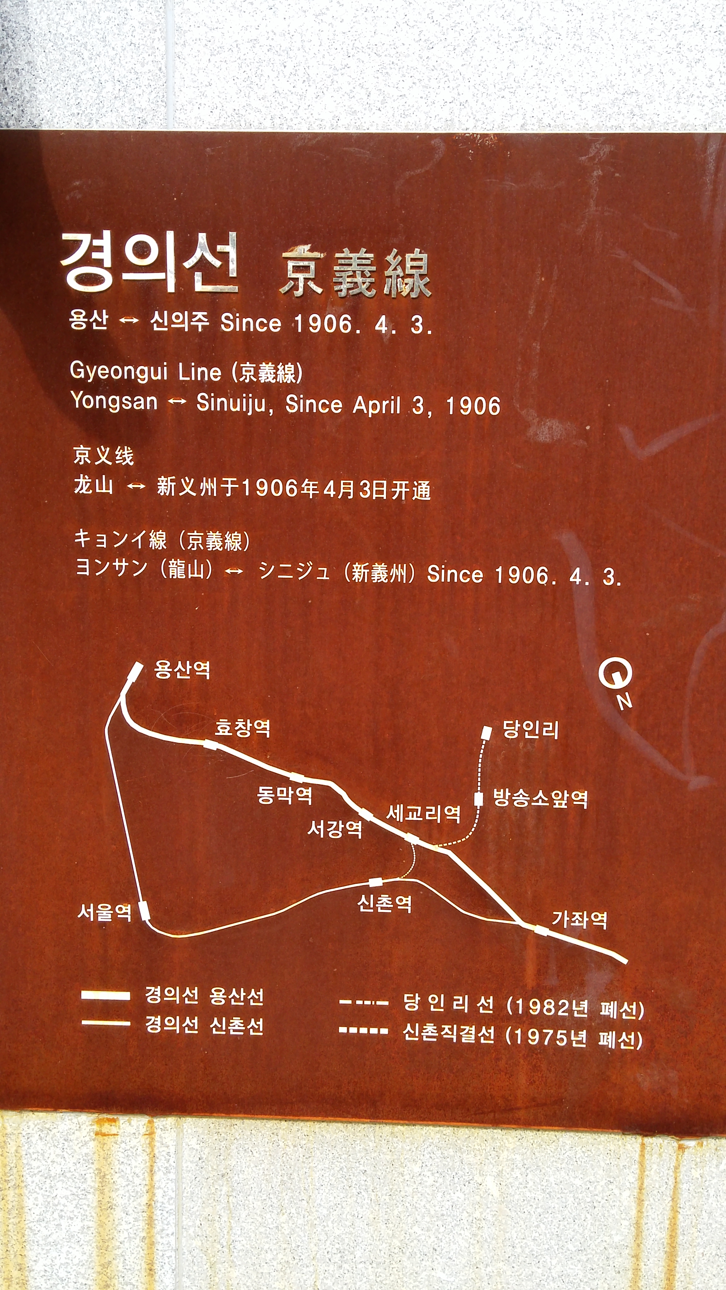 Der Park bei der ehemaligen Gyeongui-Zuglinie.